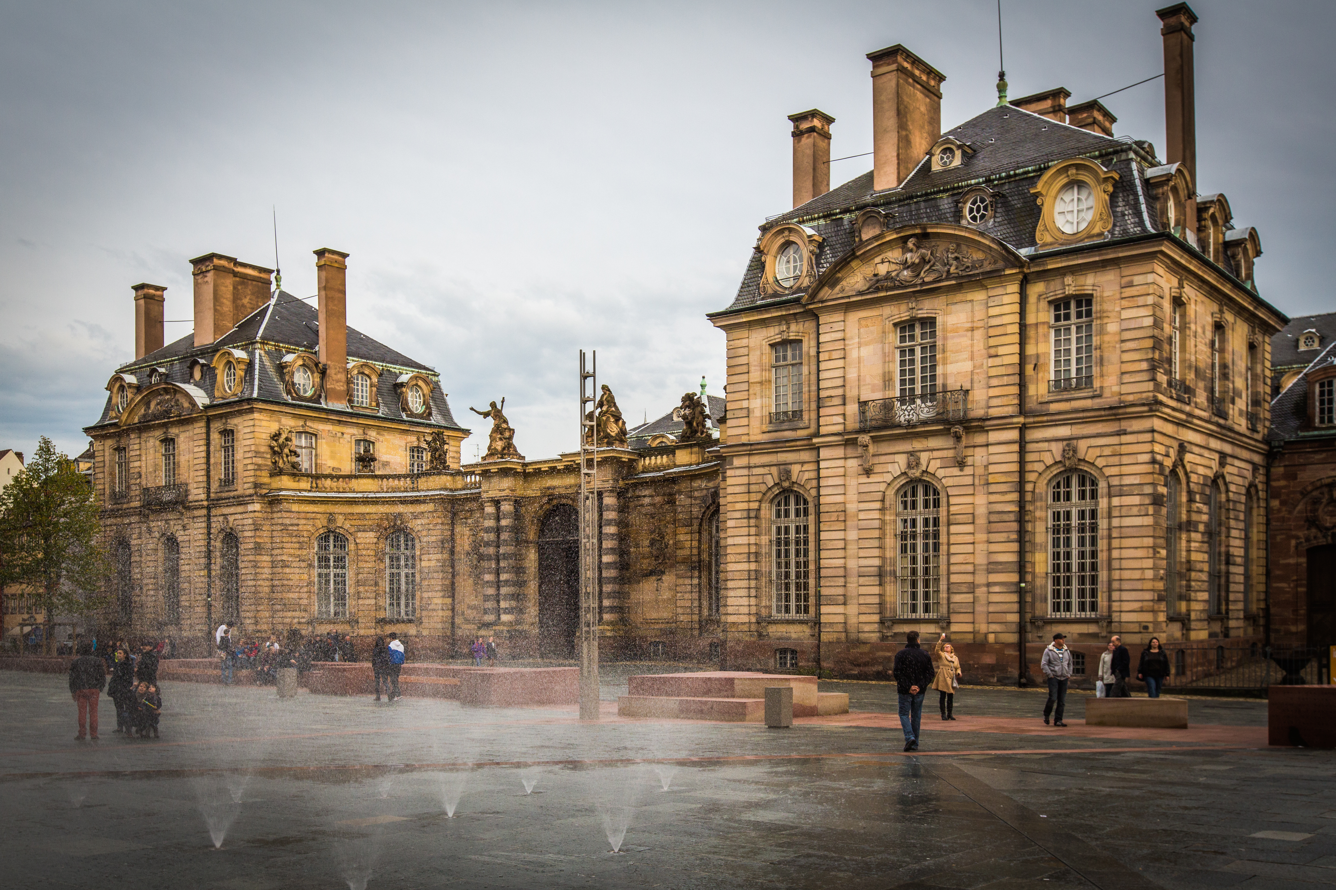 Strasbourg place du Château Palais Rohan